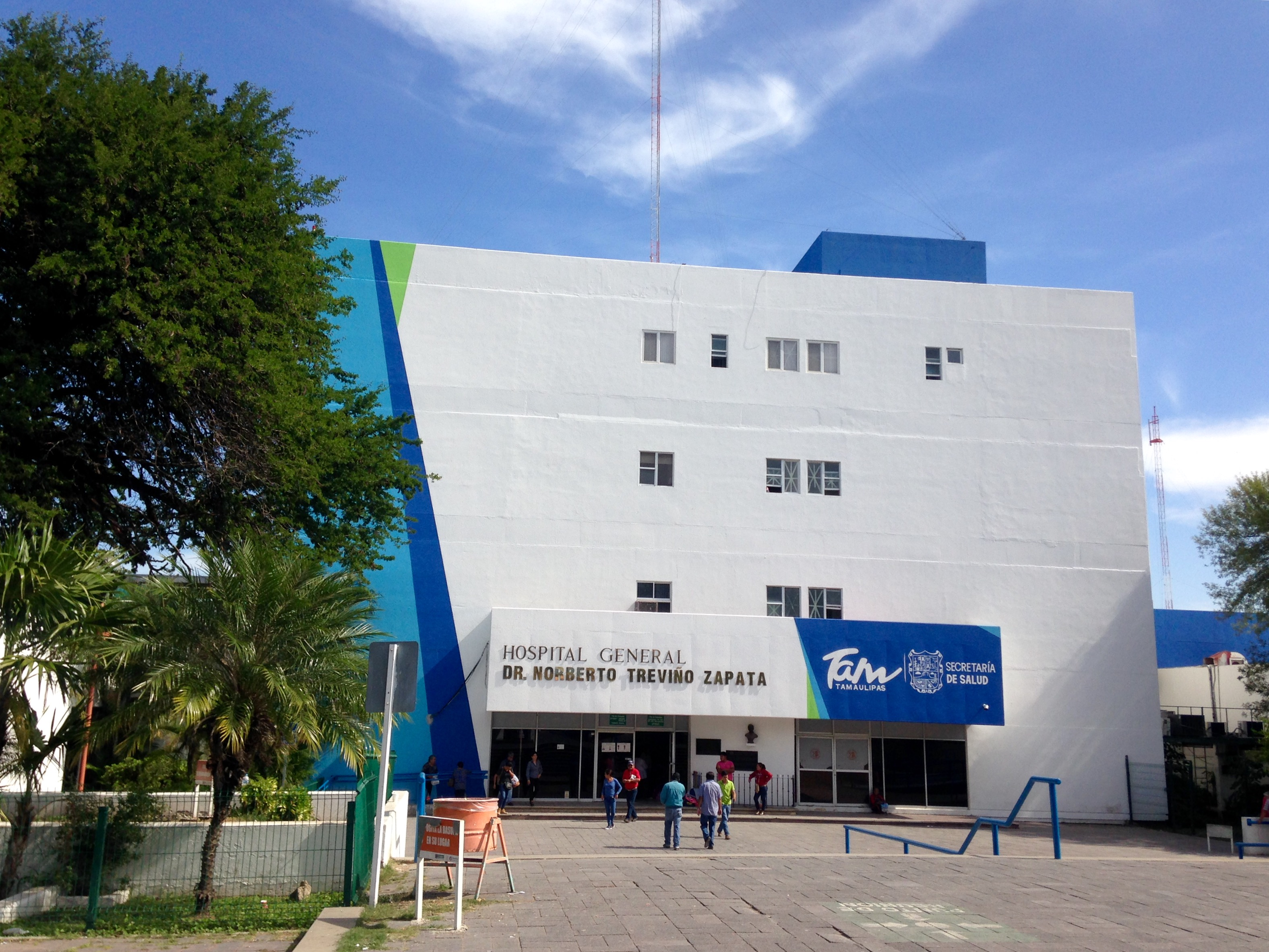 Hospital General Dr. Norberto Treviño Zapata en Ciudad Victoria, Tamaulipas.